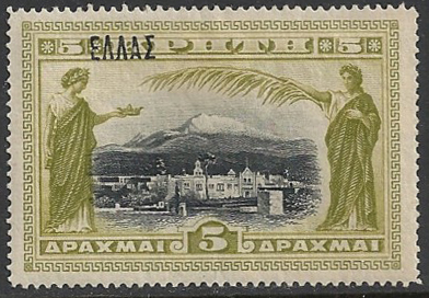 Почтовая марка Критского государства второй стандартной серии с надпечаткой "Греция"